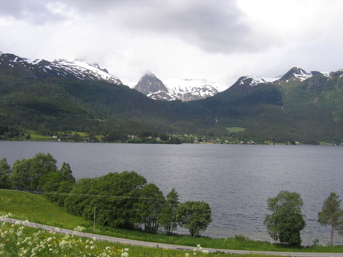 Bjørkedalen,Volda,Sunnmøre - frå Helset mot Søre Bjørkedal med Lissjetoren i bakgrunnen